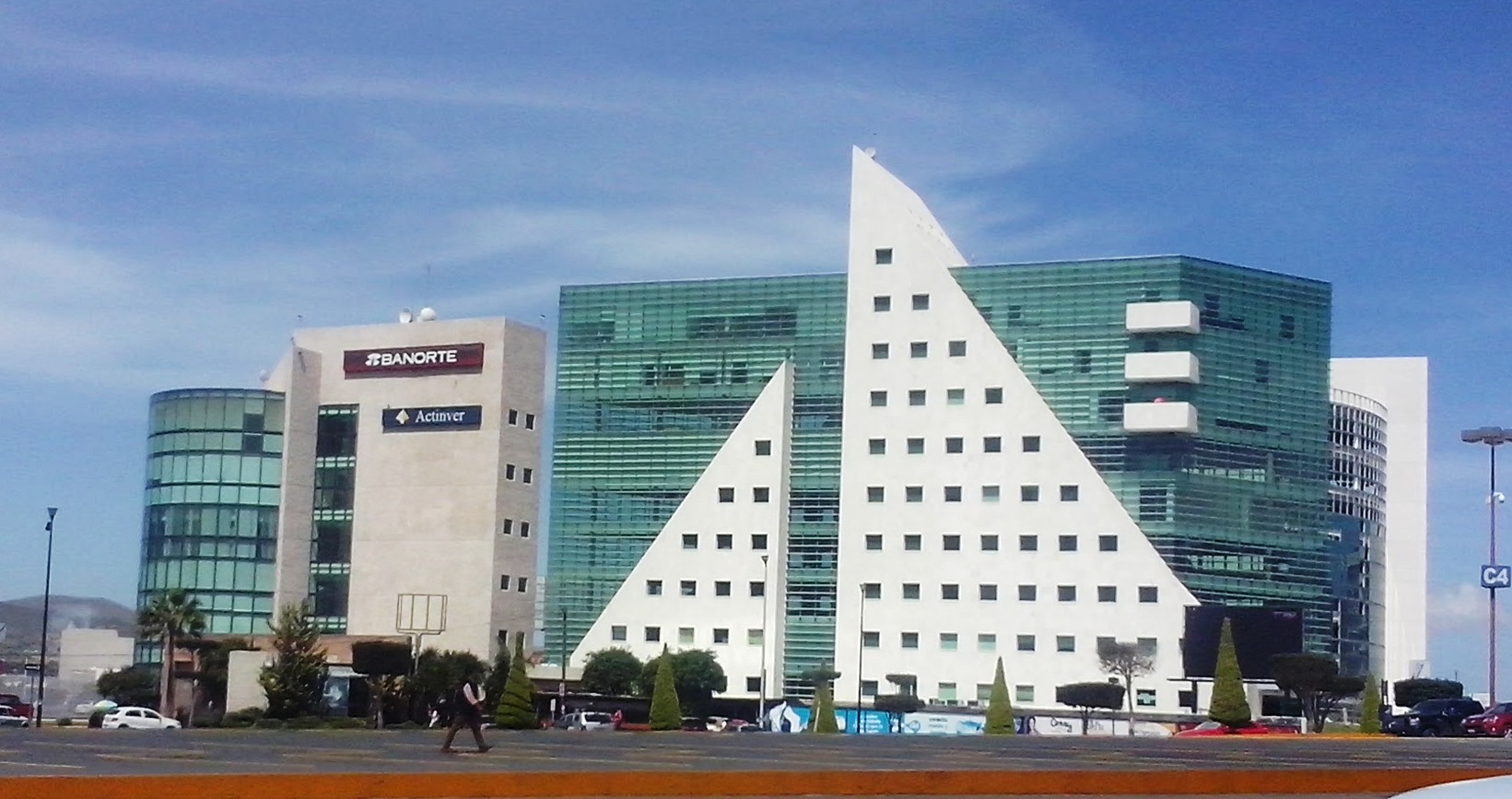 Skyline de la Zona Plateada de Pachuca de Soto, Hidalgo, México.